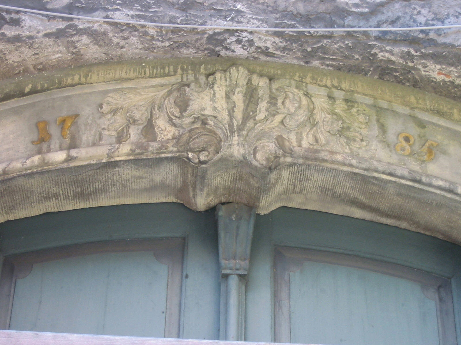 Kirchentür der Poppenburg in Burgstemmen oberhalb des Leineufers fotografiert am 11.Juni 2006 mit einer Canon Digital Ixus 300; 1024 * 680 pixel